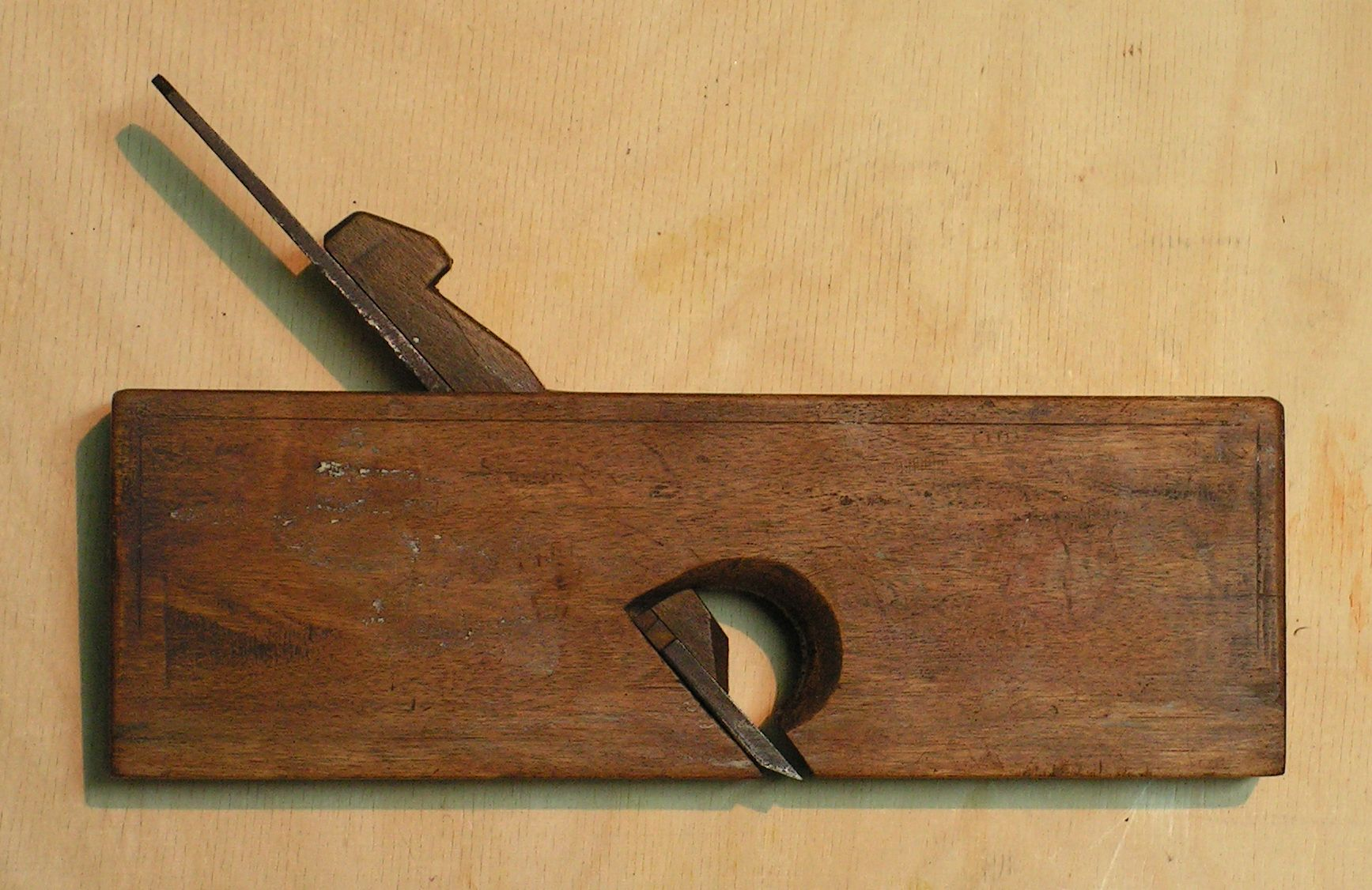 Strug kątnik ze zwykłym ostrzem.